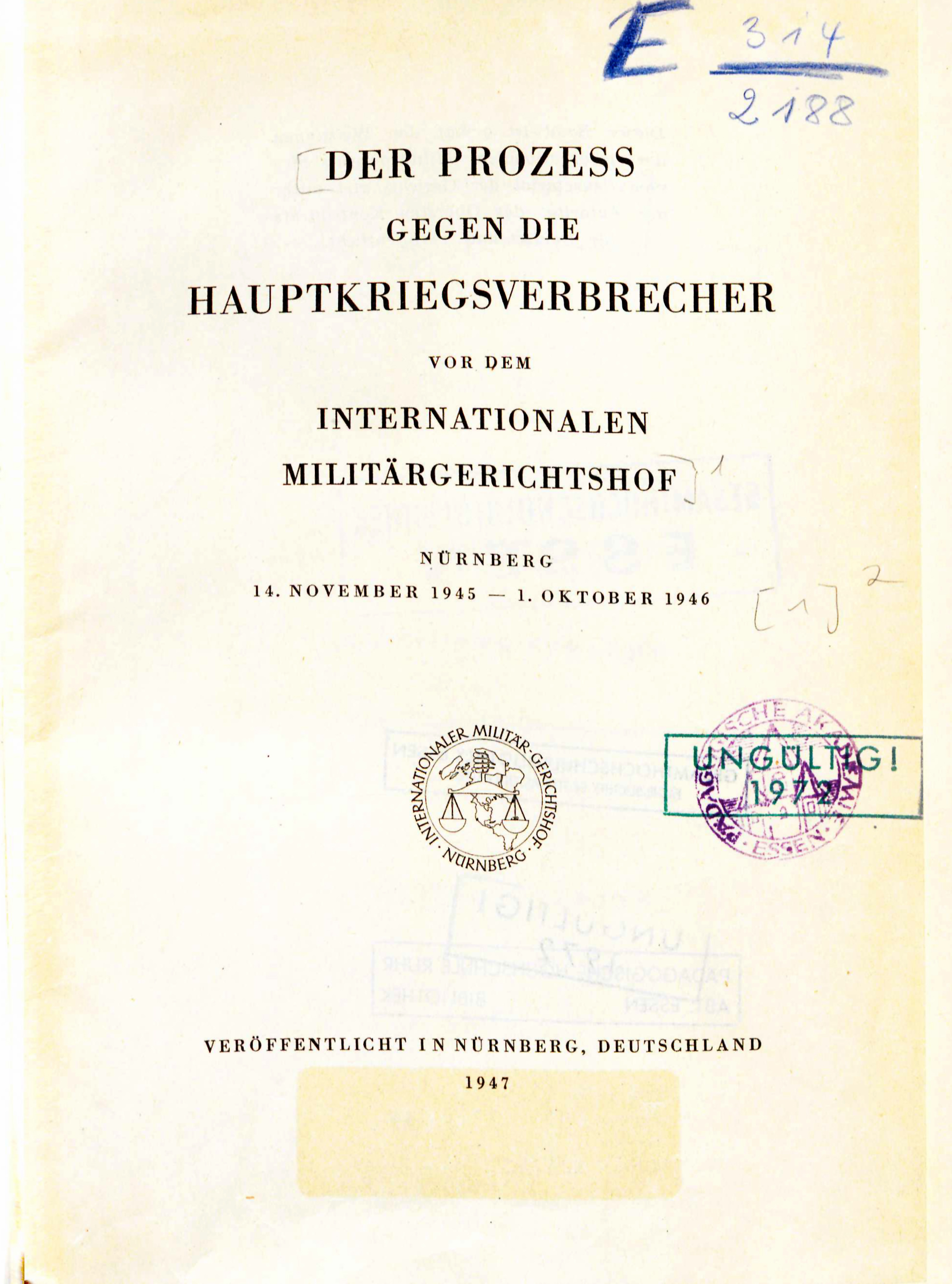 Nuremberg trials protocols German 1 1947 title